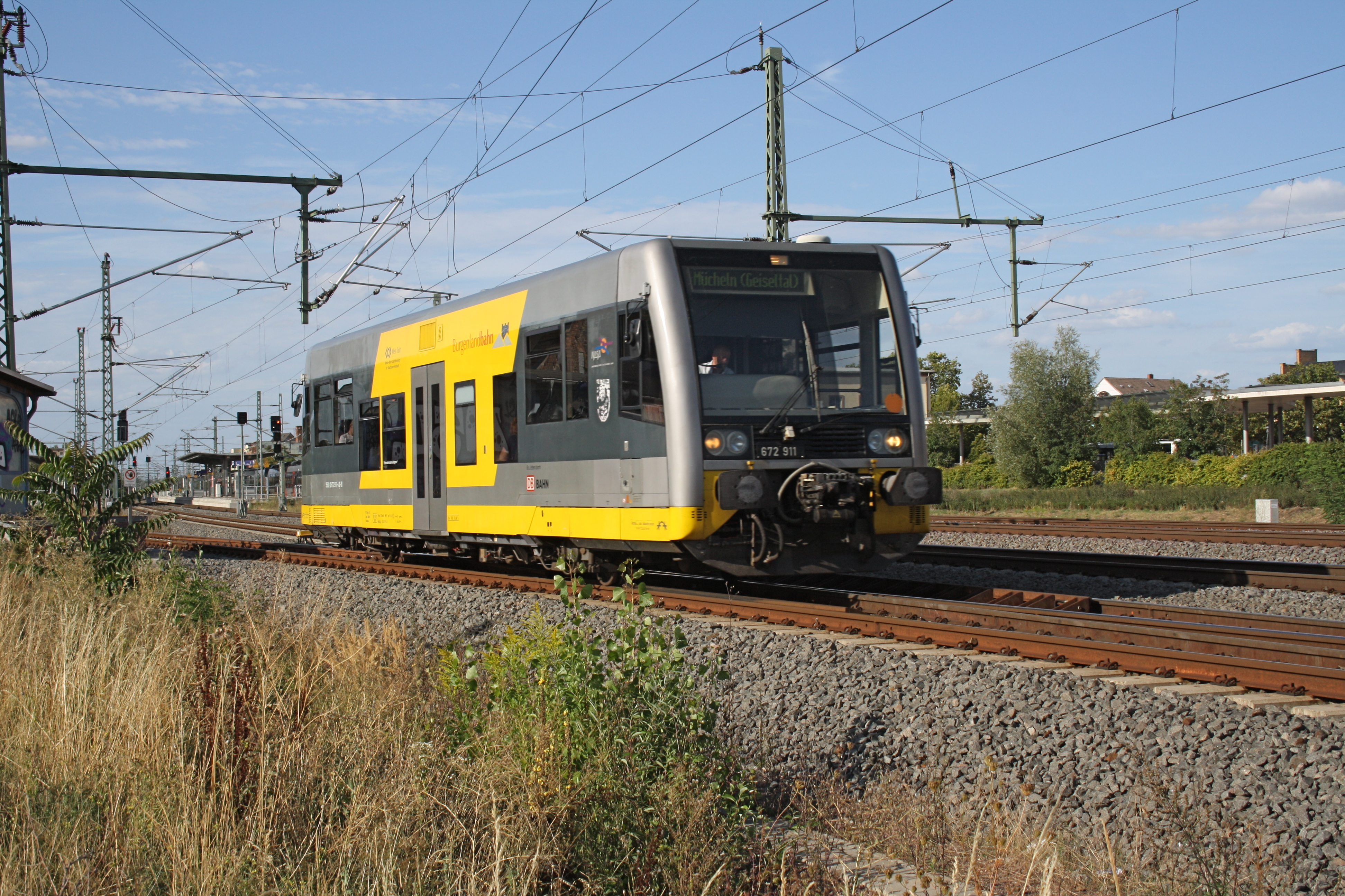 DWA LVT-S in Merseburg